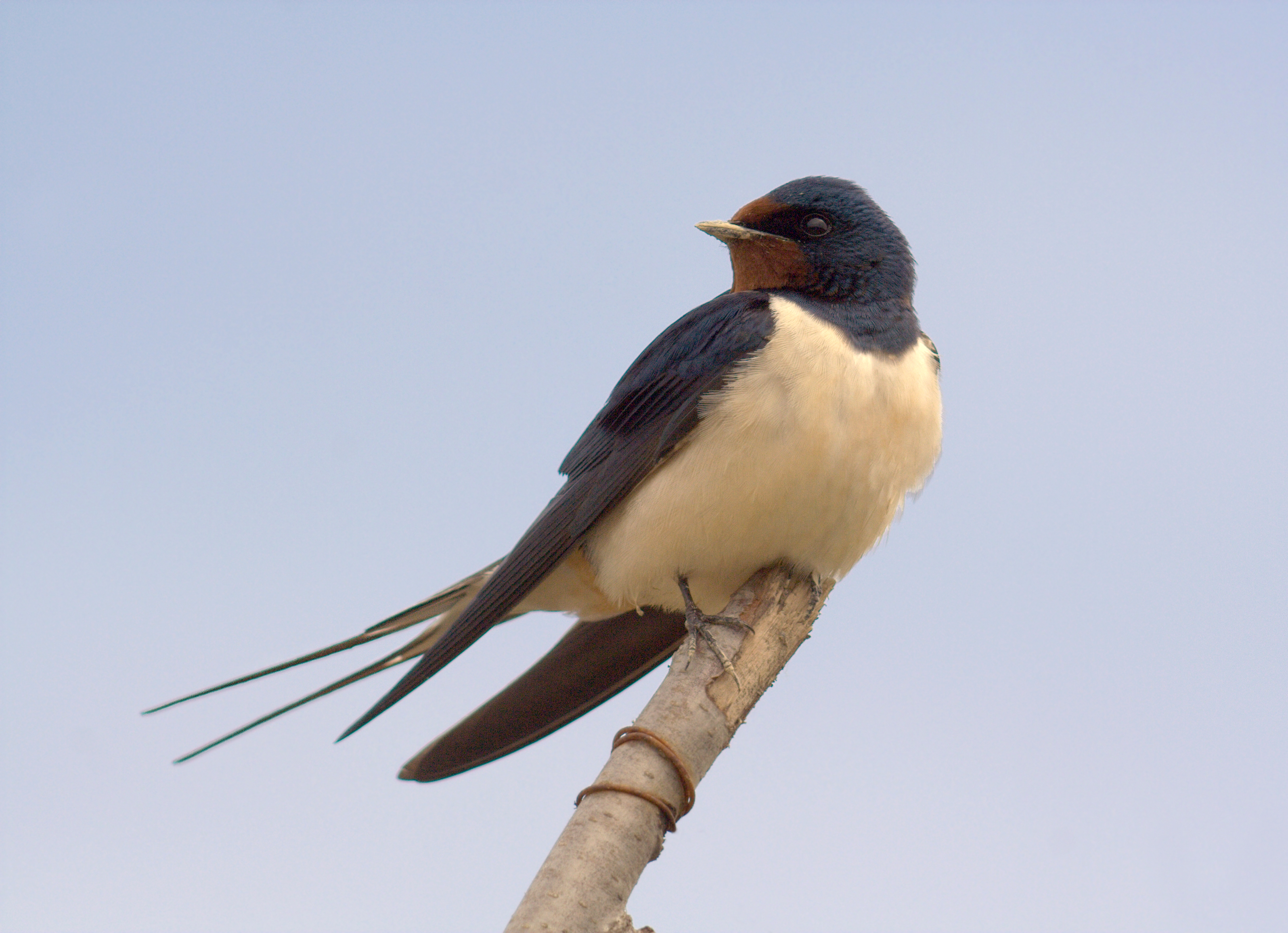 Suitsupääsuke